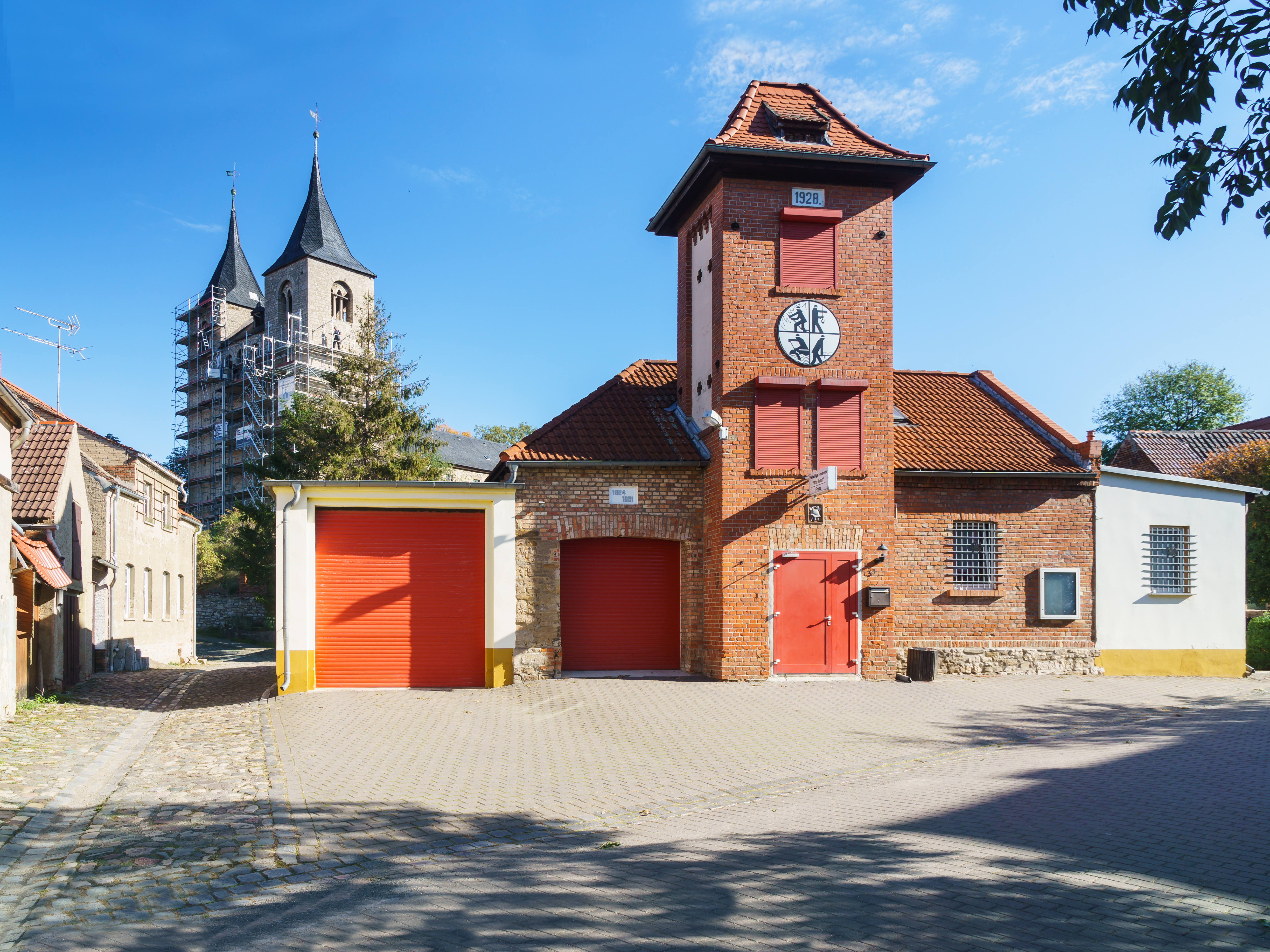 Feuerwache, Unter dem Turm 3 in Seeland OT Frose. Im Hintergrung die Stiftskirche St. Cyriakus